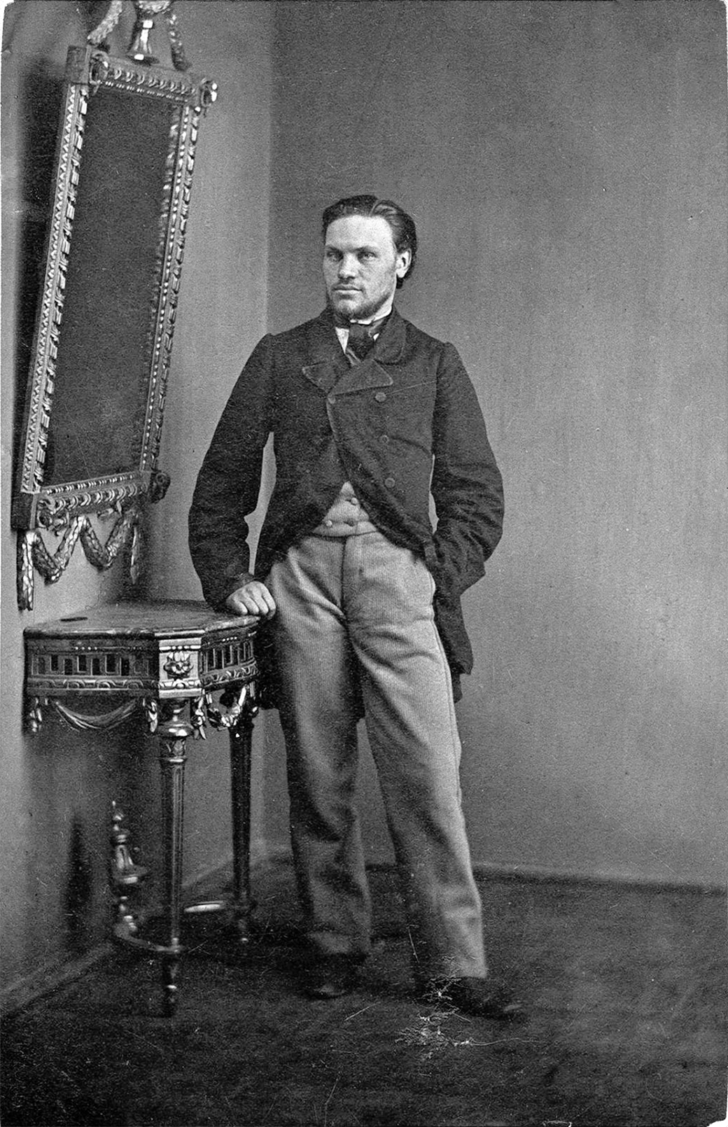 Беларуская (тарашкевіца): Партрэт Кастуся Каліноўскага (Kastuś Kalinoŭski)